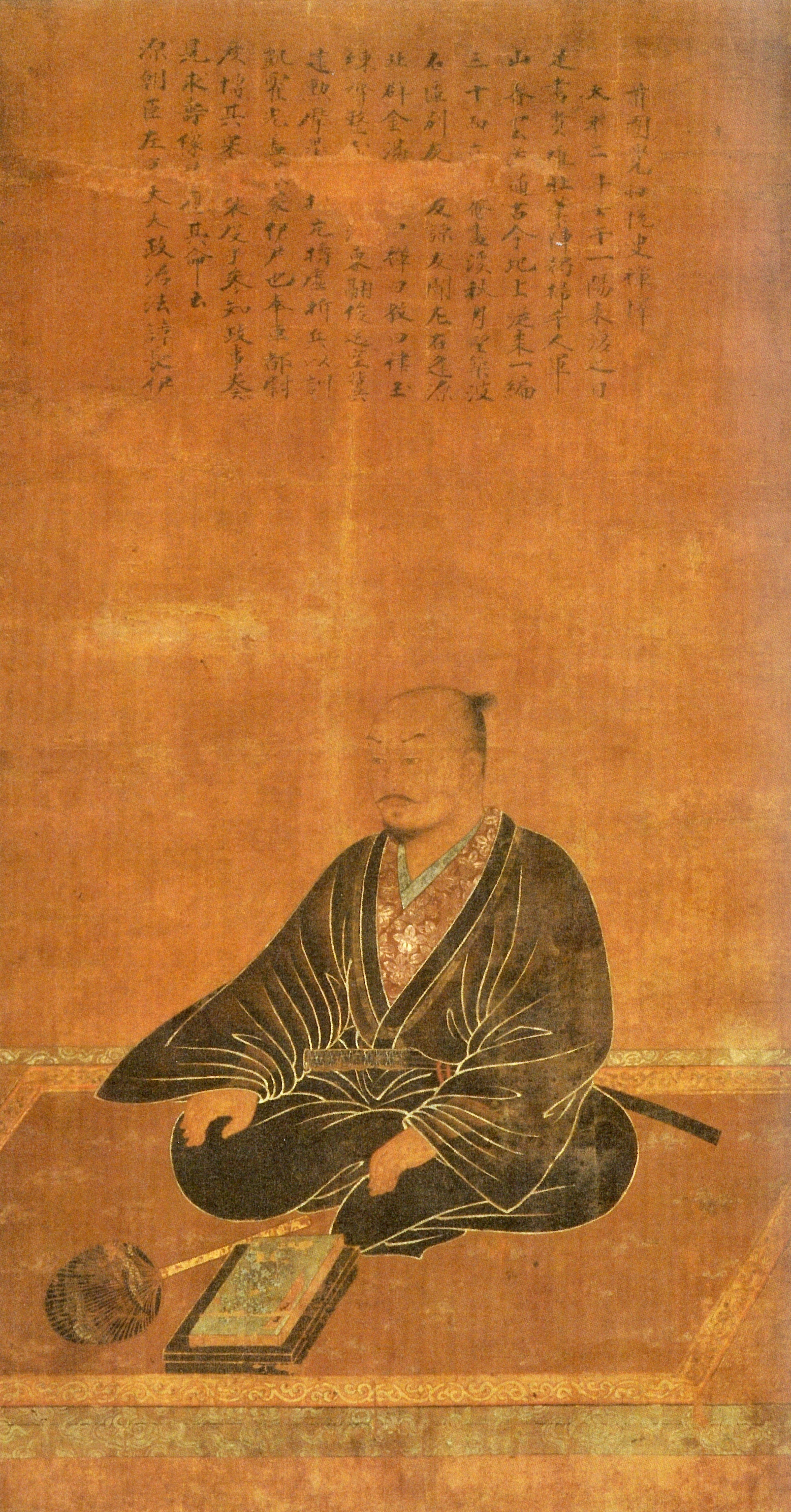 小田氏15代当主・小田政治の肖像画。